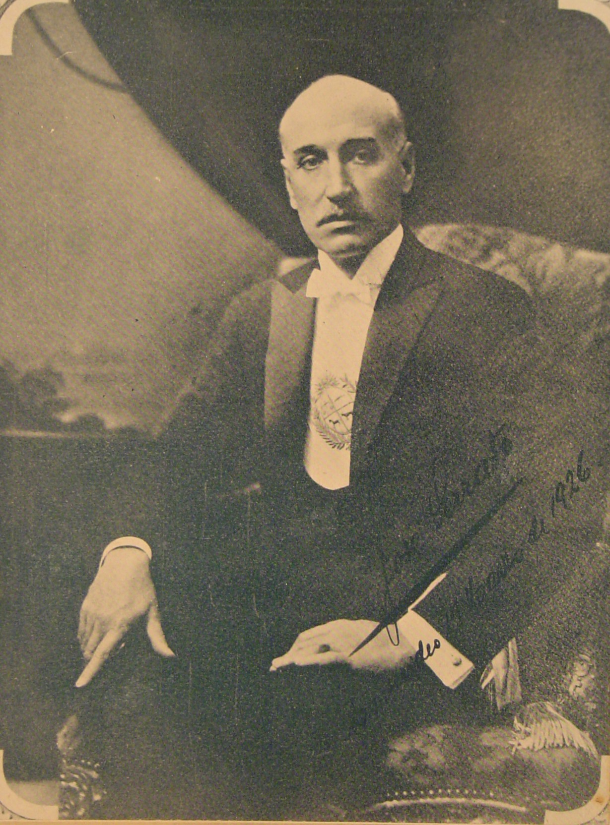 Fotografía del político uruguayo José Serrato, presidente entre 1923 y 1927.